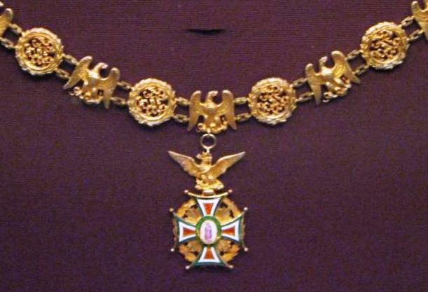 Collane des Ordens unserer Lieben Frau von Guadalupe. Wien (?), um 1864/1865. Silber vergoldet, teilweise emailiert. Inv. Nr. XIV IIb.